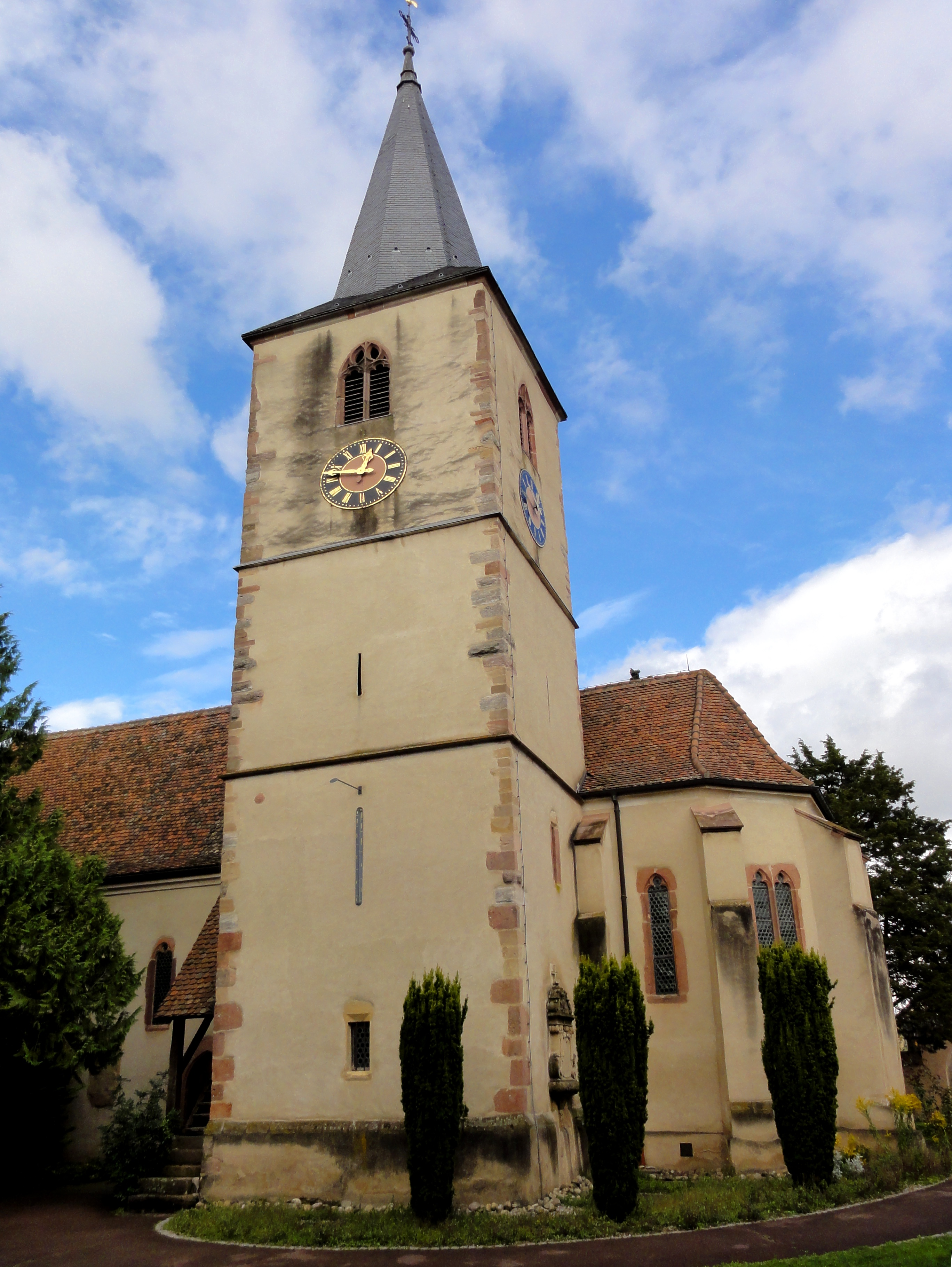 Alsace, Bas-Rhin, Baldenheim, Église protestante (PA00084595, IA67010725).